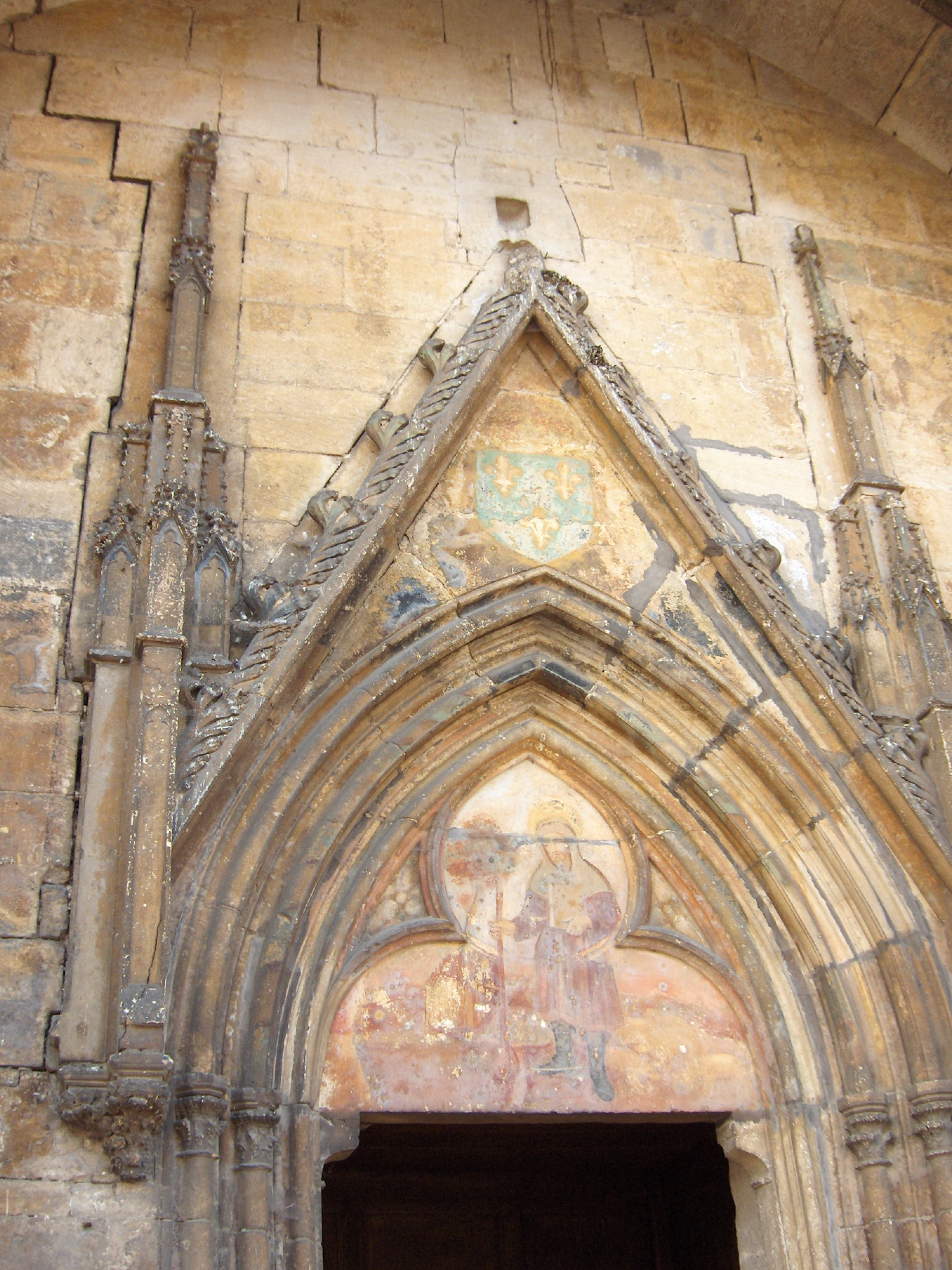 Peinture murale à l'église Saint-Florentin de Bonnet (Meuse, France)